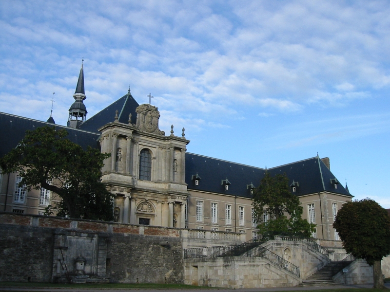 Description: Façade de la Chartreuse de Bosserville à Art-sur-Meurthe Auteur: François BERNARDIN